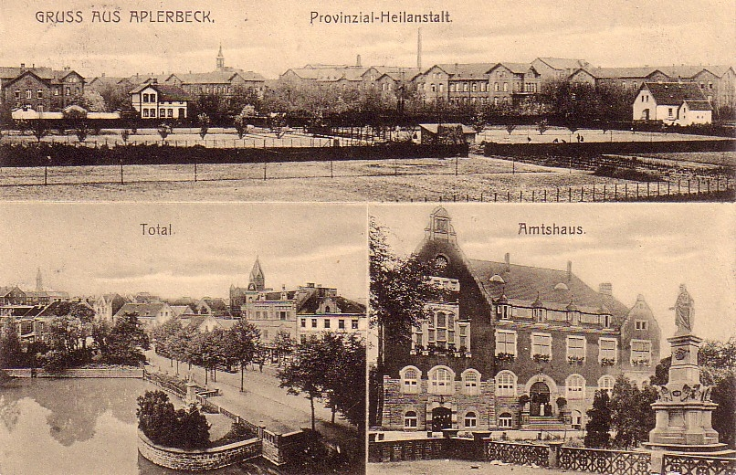 Historische Ansichten von Aplerbeck